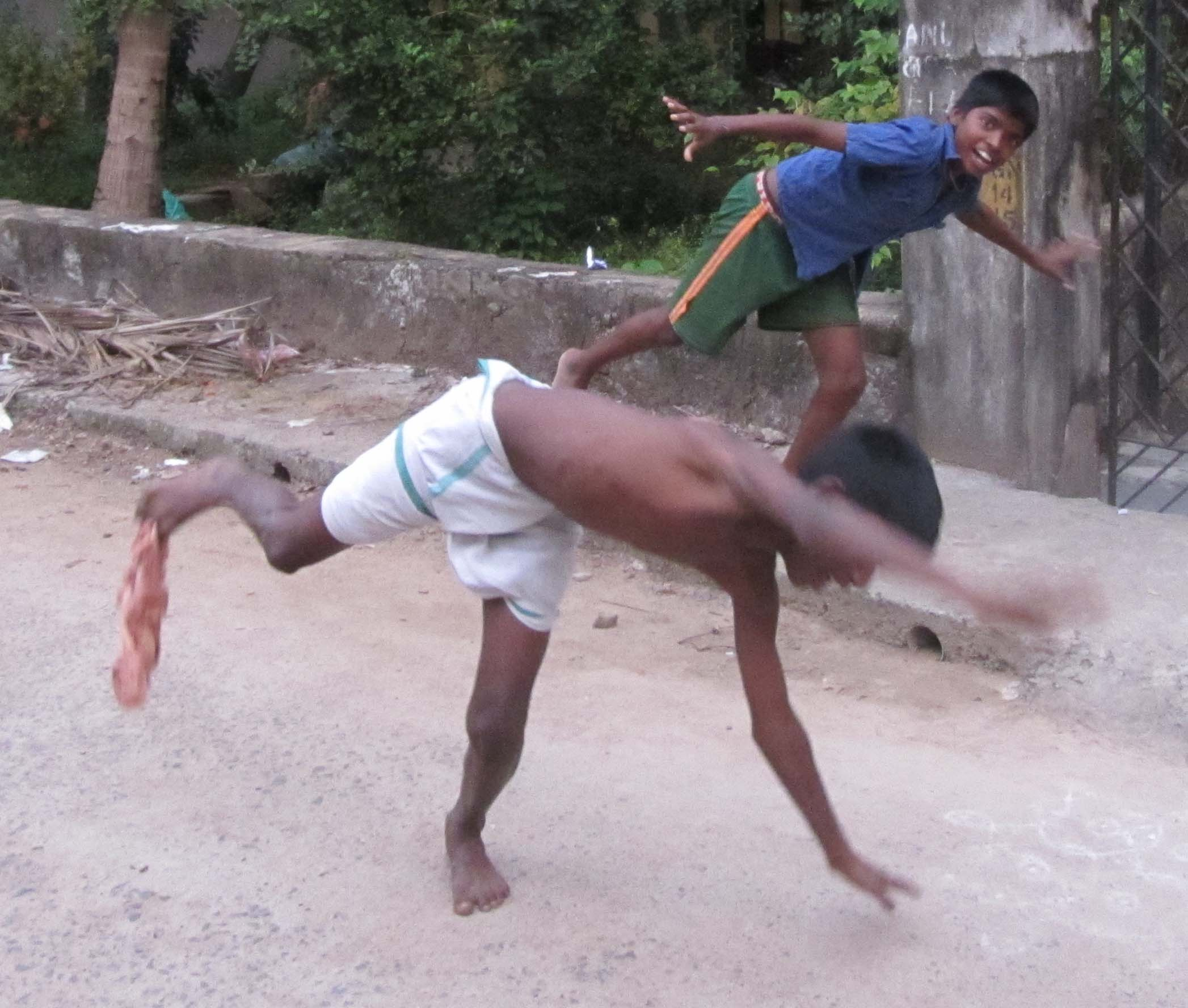 own creation - ஆனமானத்திரி, கரணப்பந்து ஆகிய விளையாட்டுகளின் இரண்டாம் படி